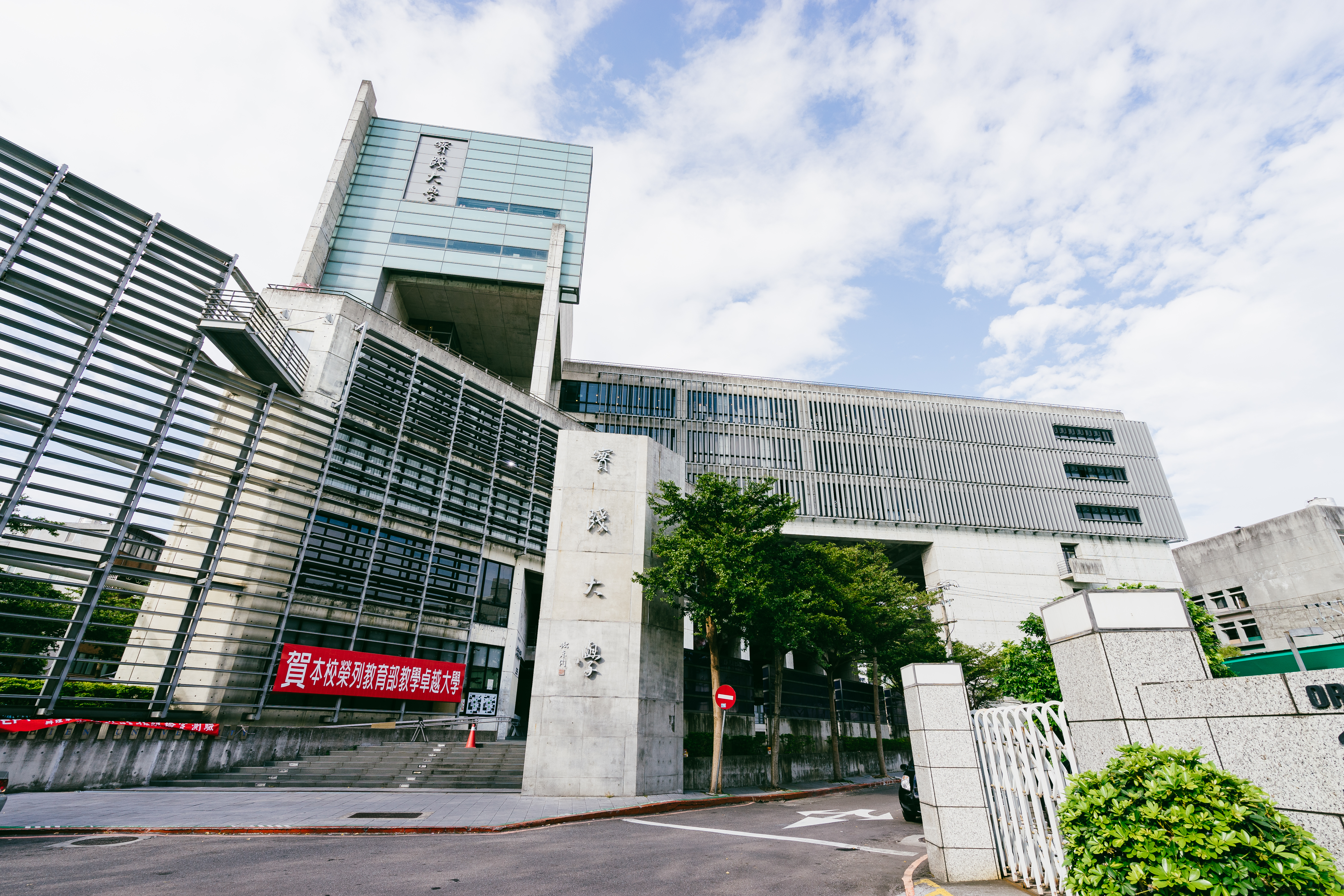 實踐大學臺北校區（校本部），位於臺灣臺北市中山區大直街70號。